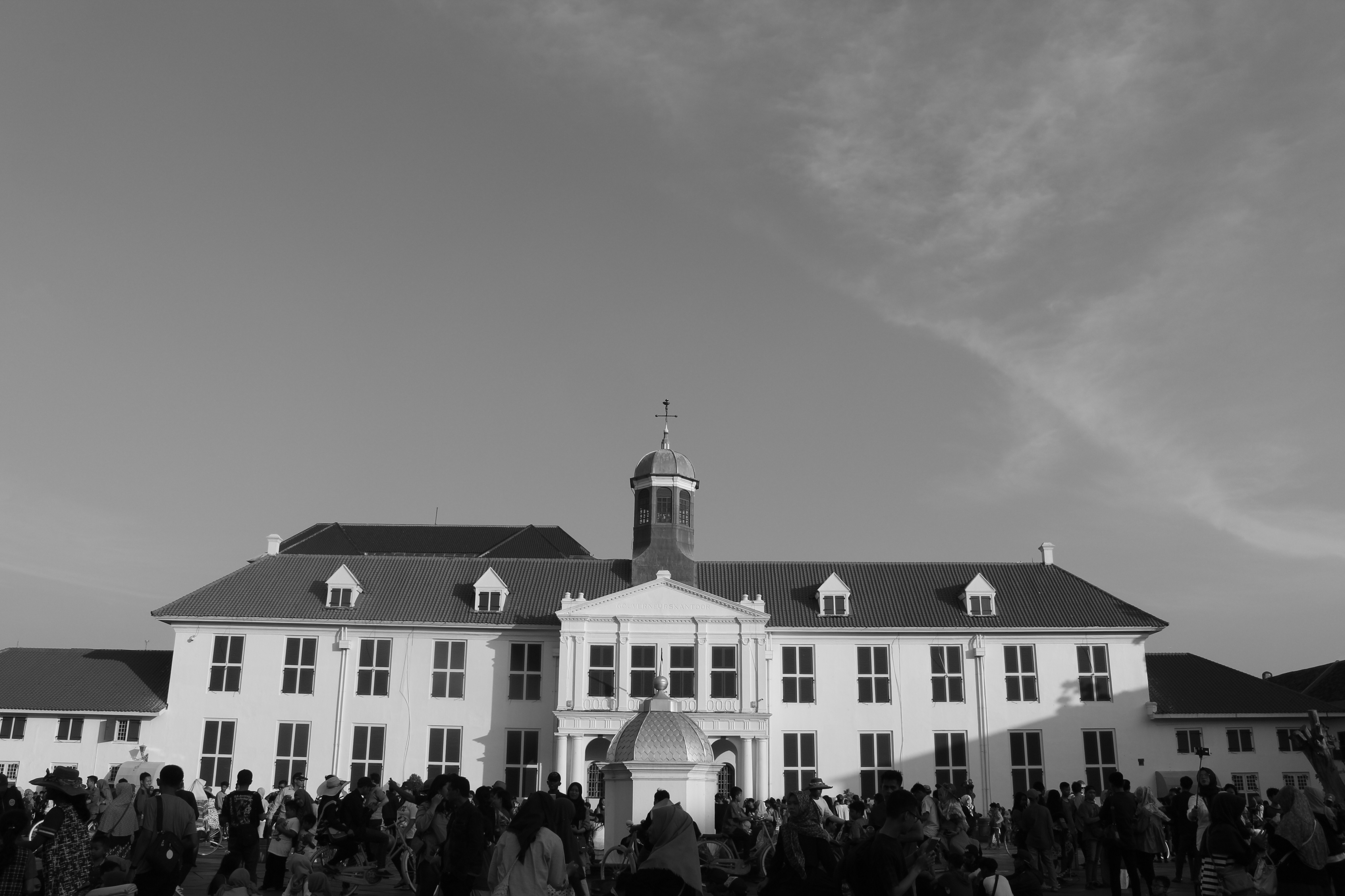 Museum Sejarah Fatahillah, Kota Tua, Jakarta